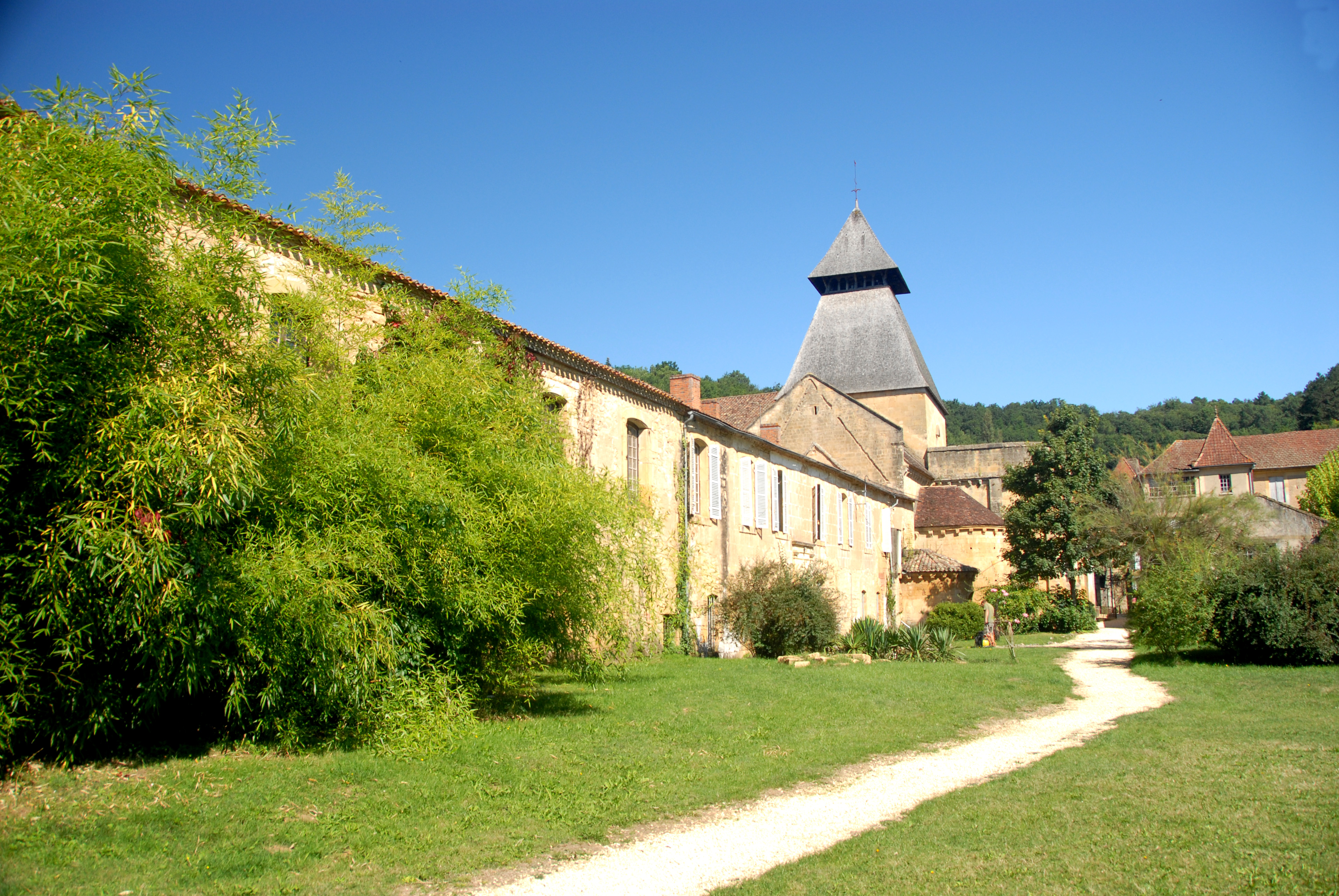 Abtei Cadouin, von SO